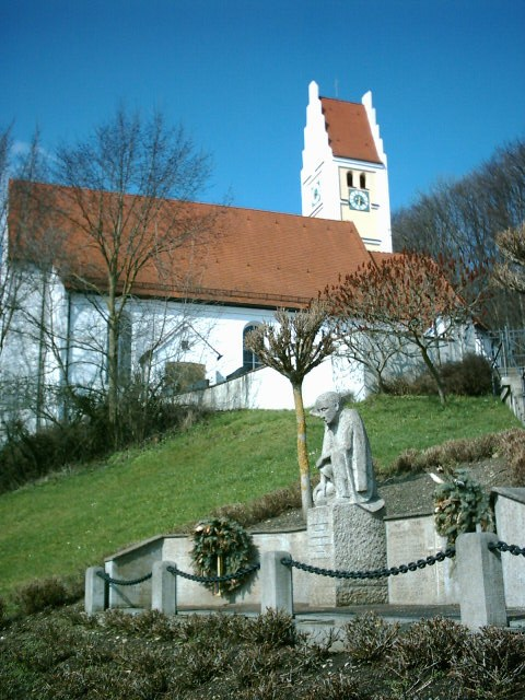 Katholische Pfarrkirche St. Johannes Baptist und Maria Magdalena in Mühlhausen (Süd-West-Ansicht); Kriegerdenkmal im Vordergrund